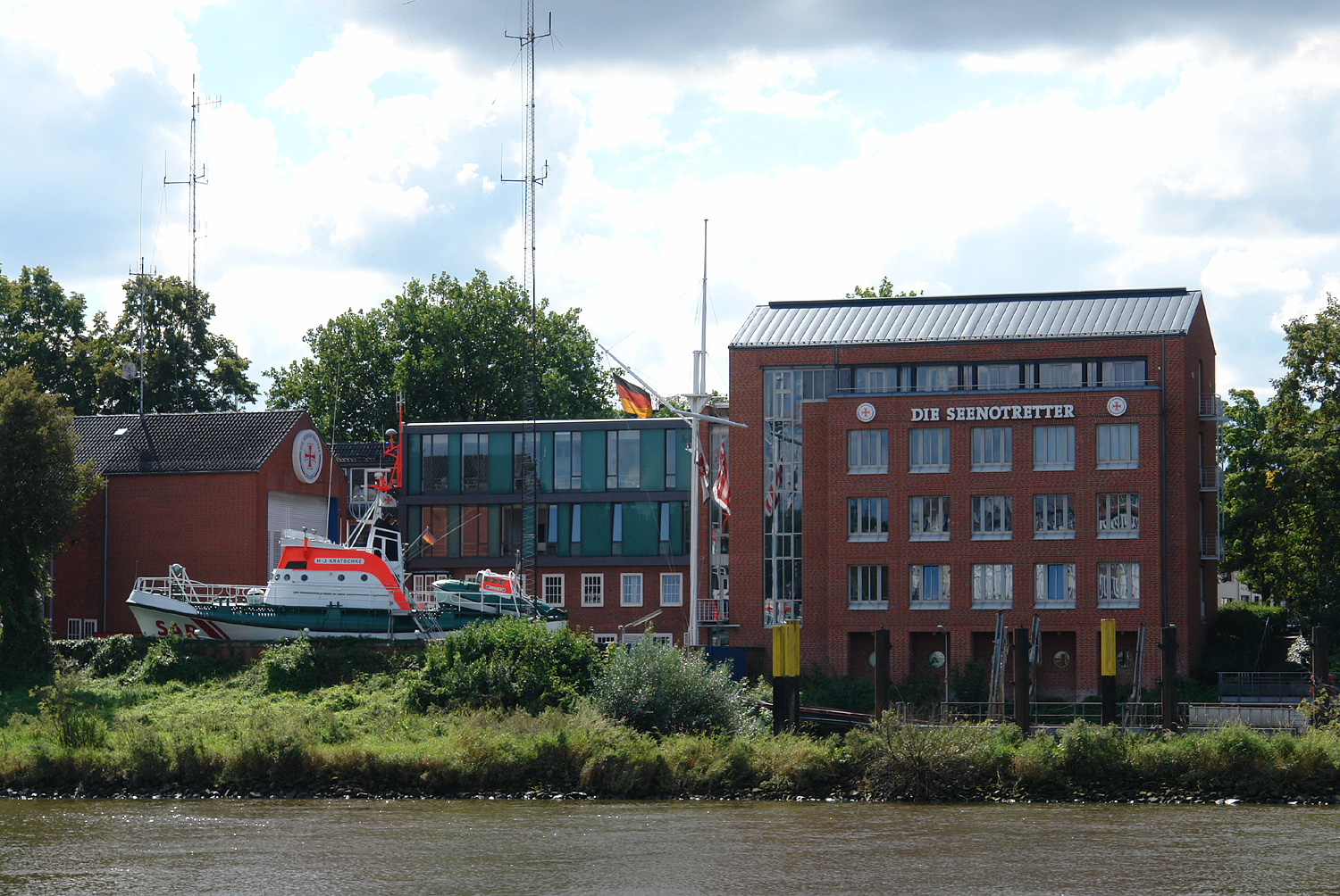 Blick von der Tiefer auf den Standort der Deutschen Gesellschaft zur Rettung Schiffbrüchiger (DGzRS) in Bremen, Werderstraße 2.